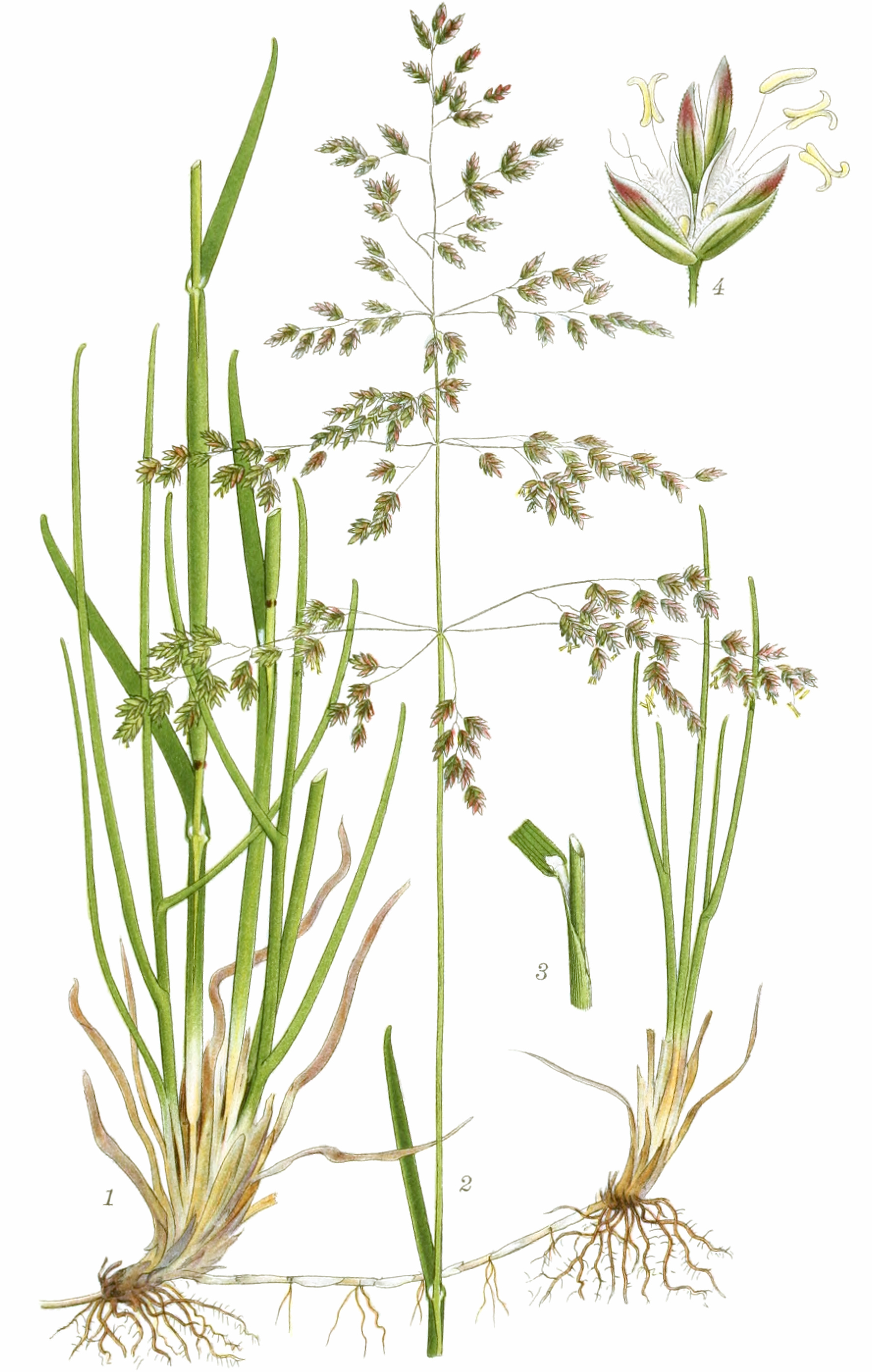 Mentz, A.; Ostenfeld, C. H.: Bilder der Nordflora. Band 2, 1917ff.Wiesen-Rispengras. Poa pratensisTafel 452. Abb. 1. Unterer Teil des Grasbüschels mit einem Ausläufer, der ebenfalls in einem Grasbüschel endet. Abb. 2. Oberer Teil. Abb. 3. Oberer Teil einer Blattscheide mit Blatthäutchen (Ligula). Abb. 4. Ährchen (5/1).